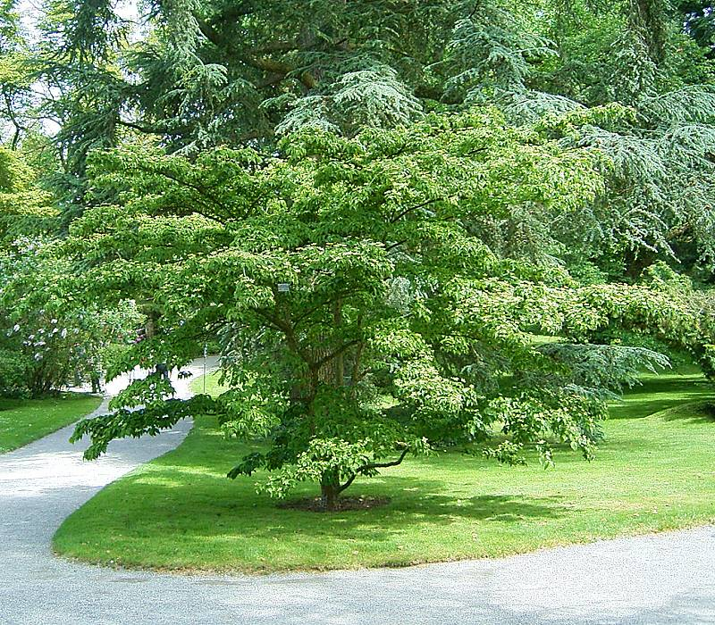 Cornus kousa